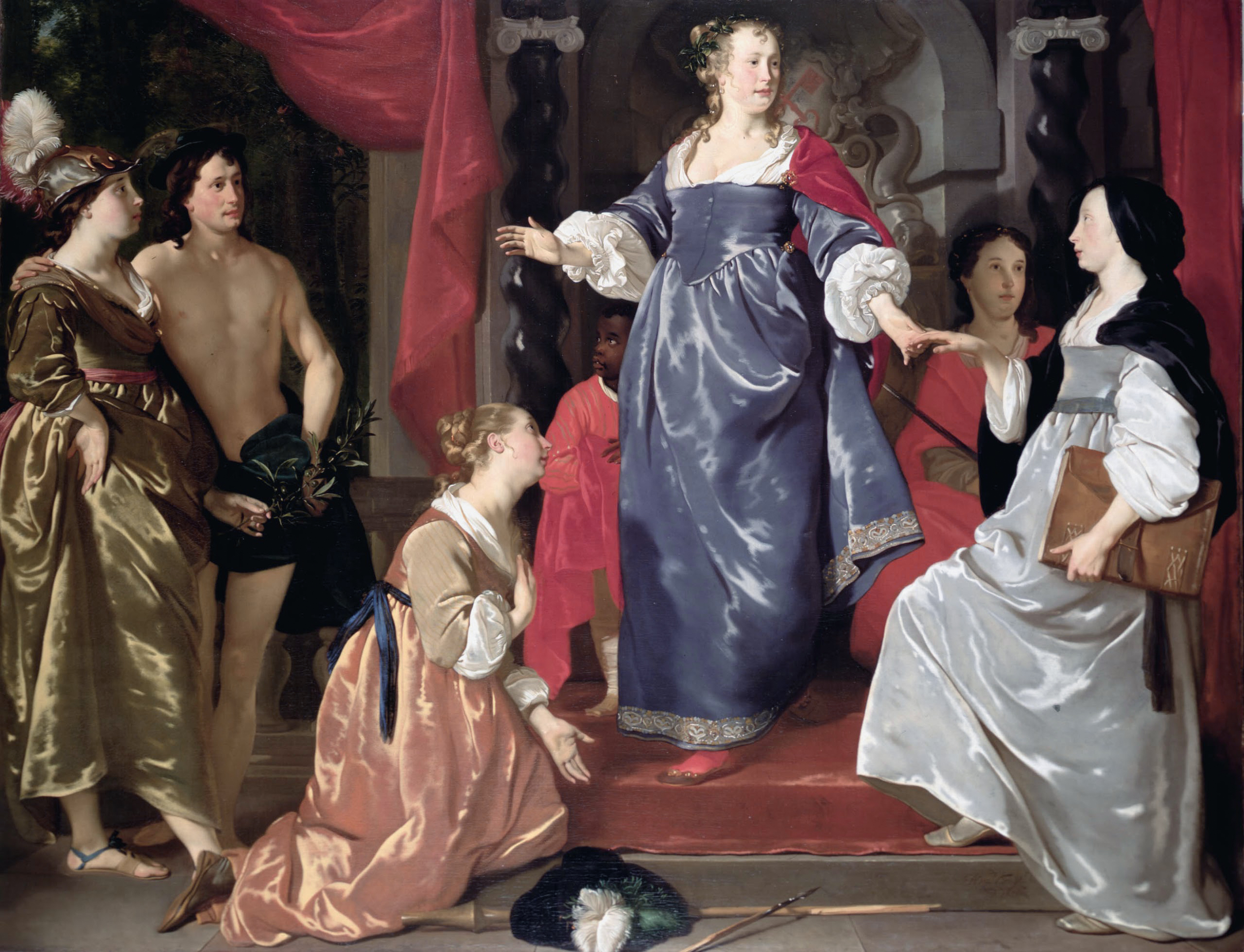 Uit het Bronnenboekje bij het Examen Havo 2011 (Tijdvak 1) komt de volgende toelichting: Tussen 1648 en 1651 schildert Abraham Lambertsz. van den Tempe in opdracht van het stadsbestuur van Leiden een drietal grote schilderwerken met allegorische voorstellingen voor de nieuwe Lakenhal. In dit schilderij uit 1651 is het thema 'de Nering' (hier: de Leidse lakennijverheid). Van links naar rechts stellen de figuren op de voorgrond voor: Minerva (godin van de Wijsheid) en Mercurius (god van de Handel), de Vrede (knielend), de stedenmaagd Leiden, de Nering.